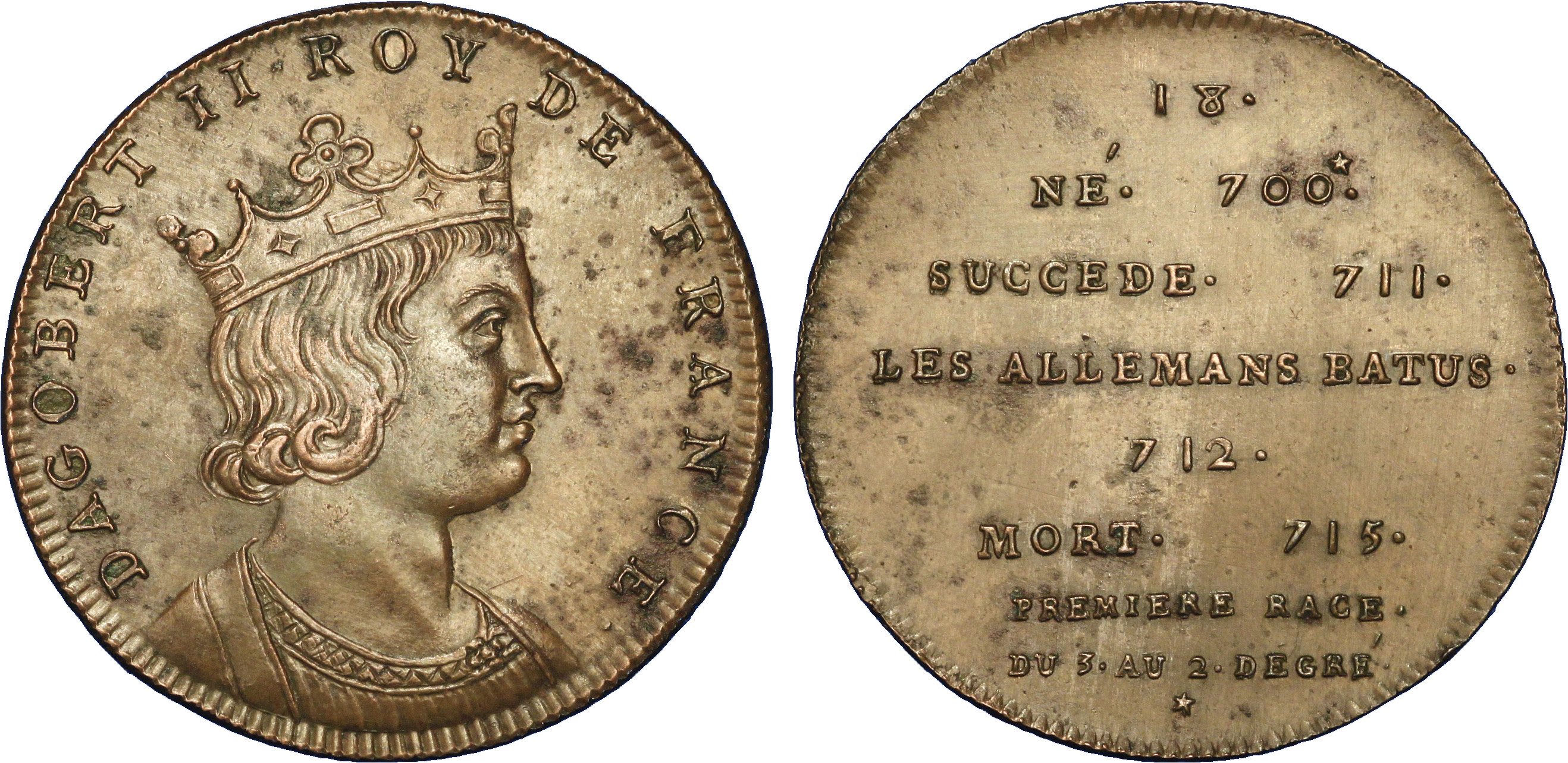 Métal : cuivre rouge Diamètre : 32mm Axe des coins : 12h. Poids : 09,03g. Tranche : cannelée Degré de rareté : R1 Titulature avers : DAGOBERT II ROY DE FRANCE. Description avers : Buste imaginaire drapé et couronné à droite. Titulature revers : 18- NÉ 700* - SUCCEDE 711 - LES ALLEMANS BATUS 712 - MORT 715 - PREMIERE RACE DU 3 AU 2 DEGRE / *. Description revers : en huit lignes.